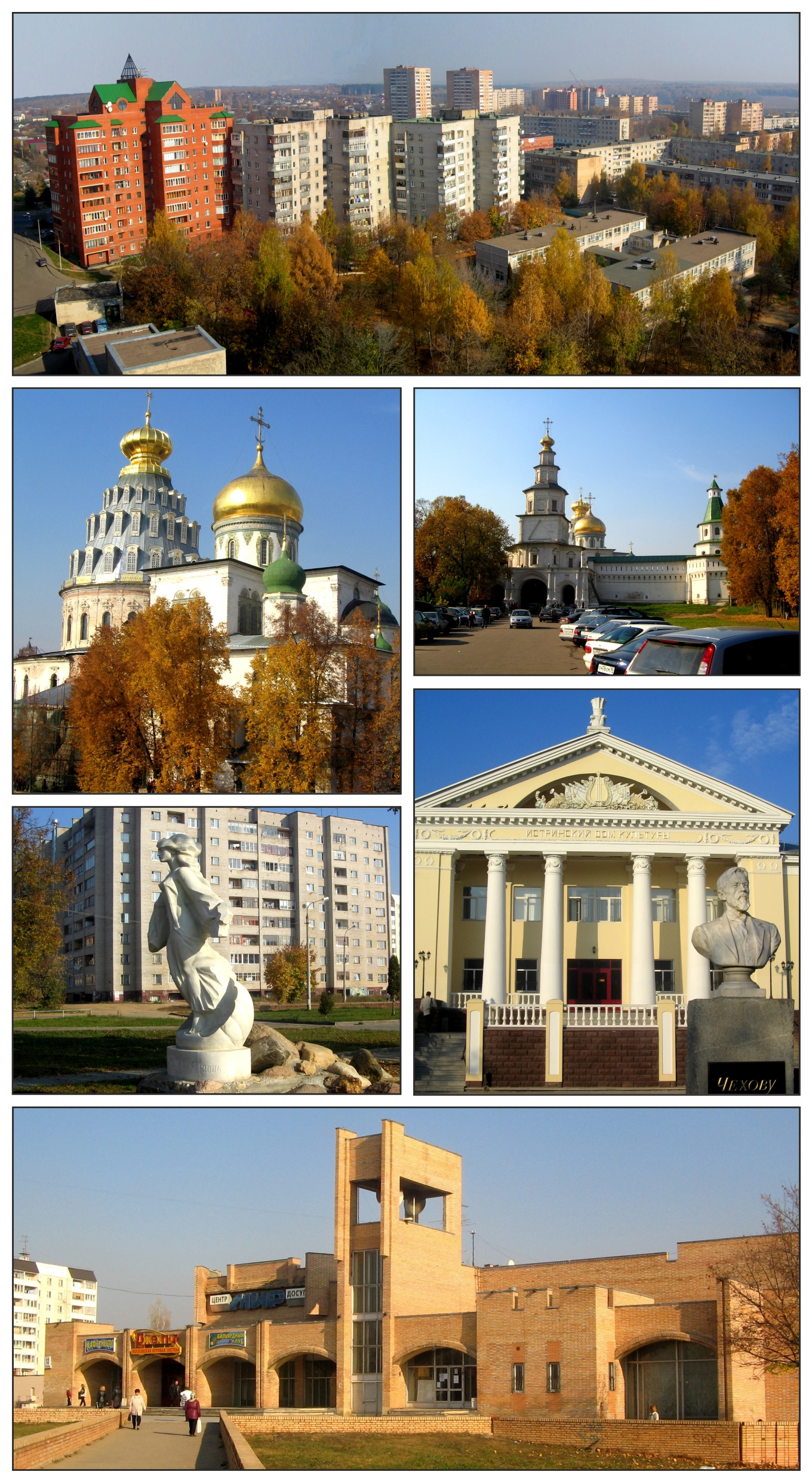 Коллаж из фотографий собственной съёмки.